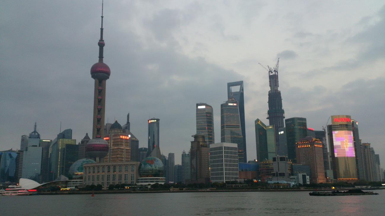 Skyline de Pudong, Lujiazui, photo prise du Bund.